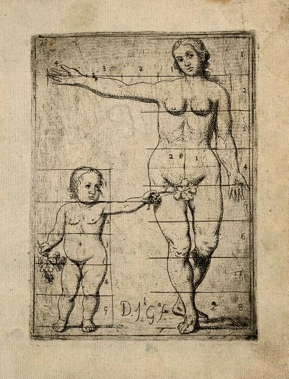 José García Hidalgo, lámina de los “Principios para estudiar el nobilísimo y real arte de la pintura”, Madrid, 1691.